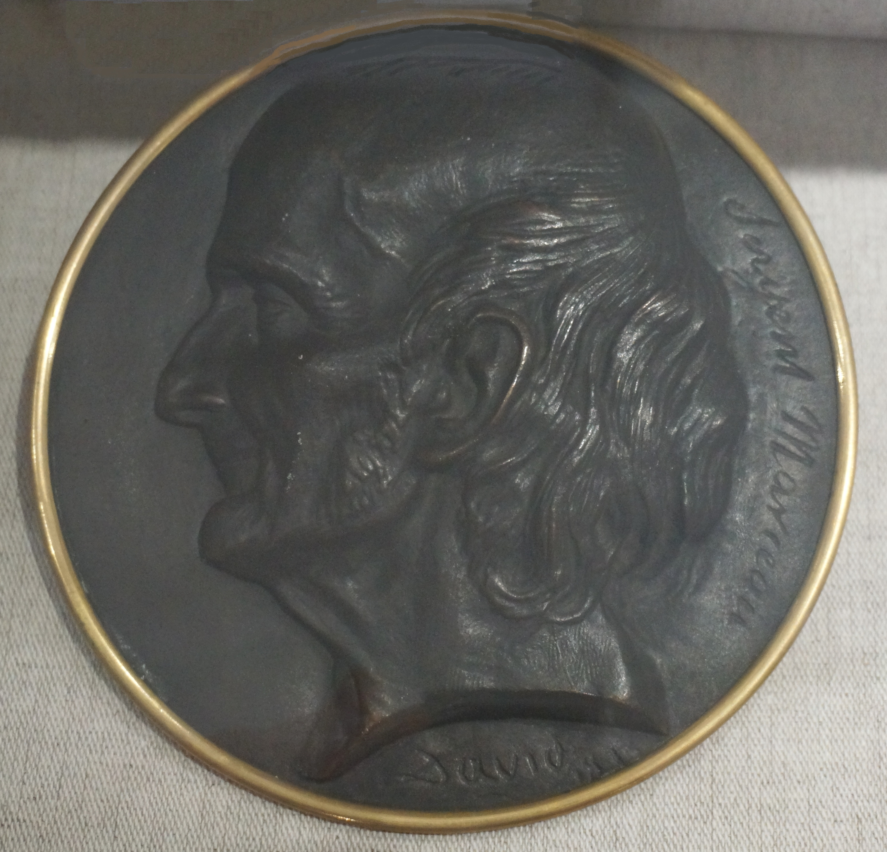 dans les ► Collections of Musée de la Préfecture de Police (Paris).